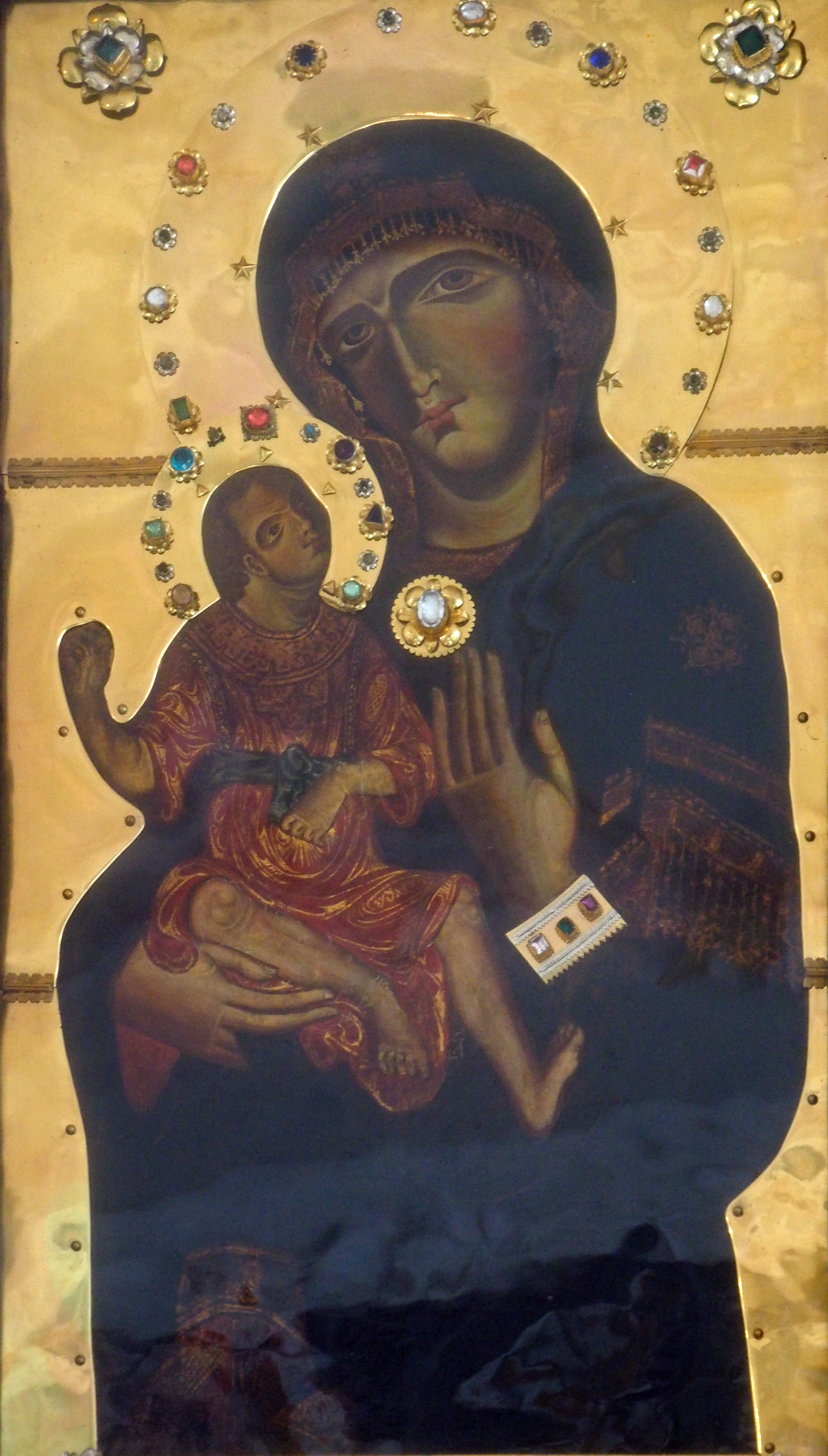 Gnadenbild in der Gnadenkapelle, Alte Kapelle Regensburg. Papst Benedikt VIII soll Kaiser Heinrich im Jaahre 1014 diese Marienbild anlässlich der Kaiserkrönung in Rom übergeben haben.